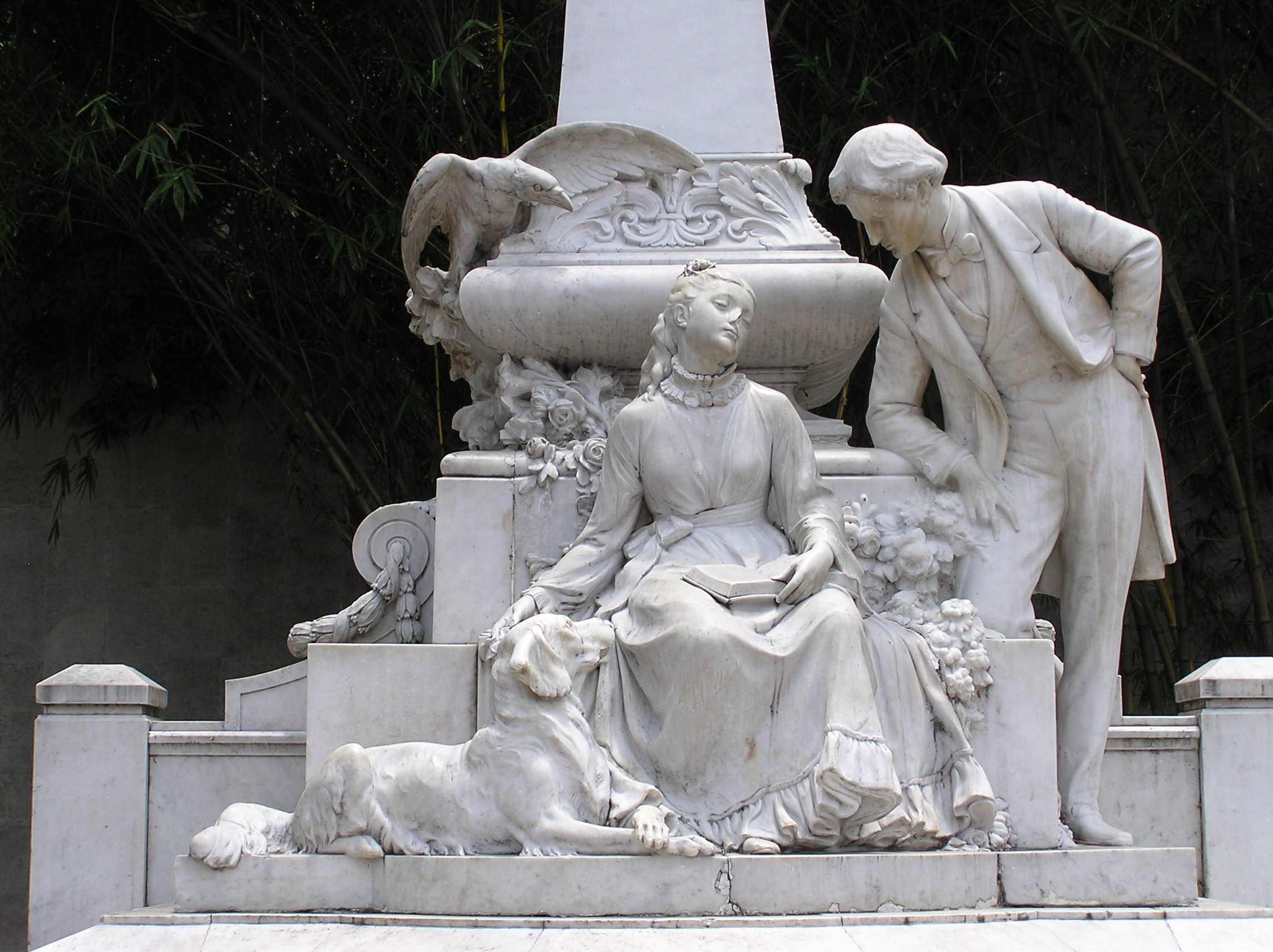 Monumento a Maria en Cali, Colombia